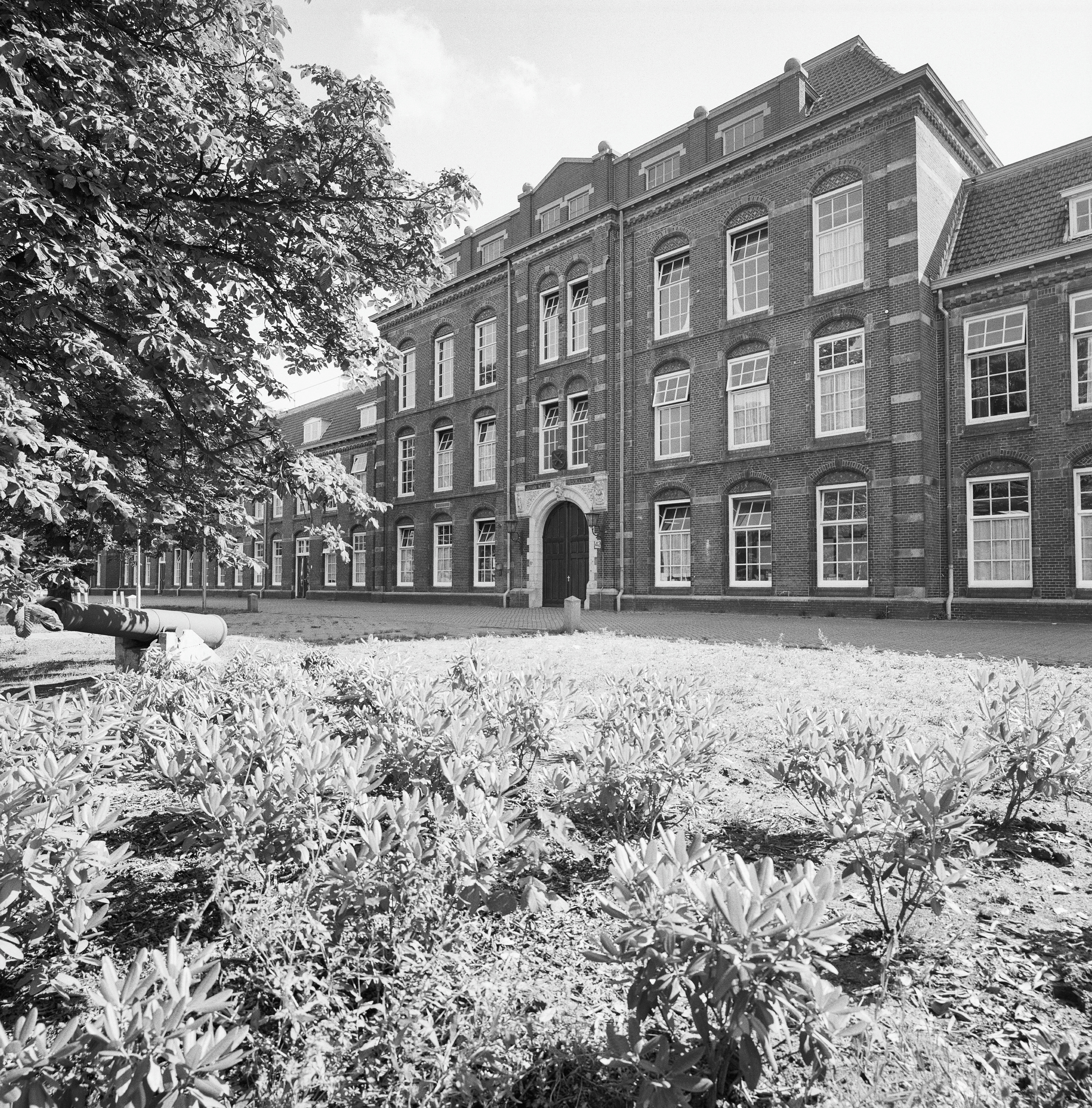 JOHAN WILLEM FRISO KAZERNE: Exterieur OVERZICHT VOORGEVEL